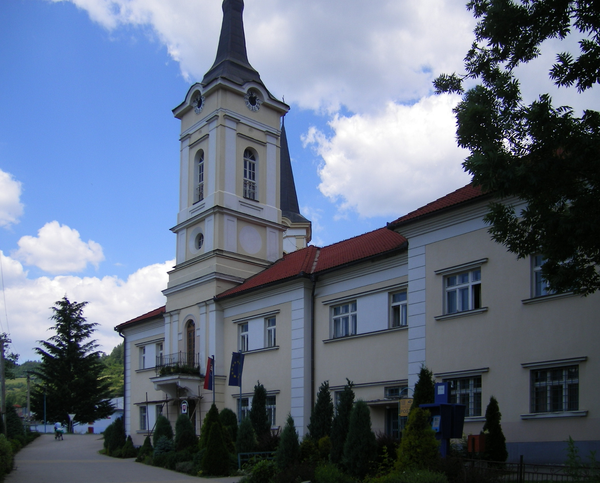 Nálepkovo (okres Gelnica) - town hall